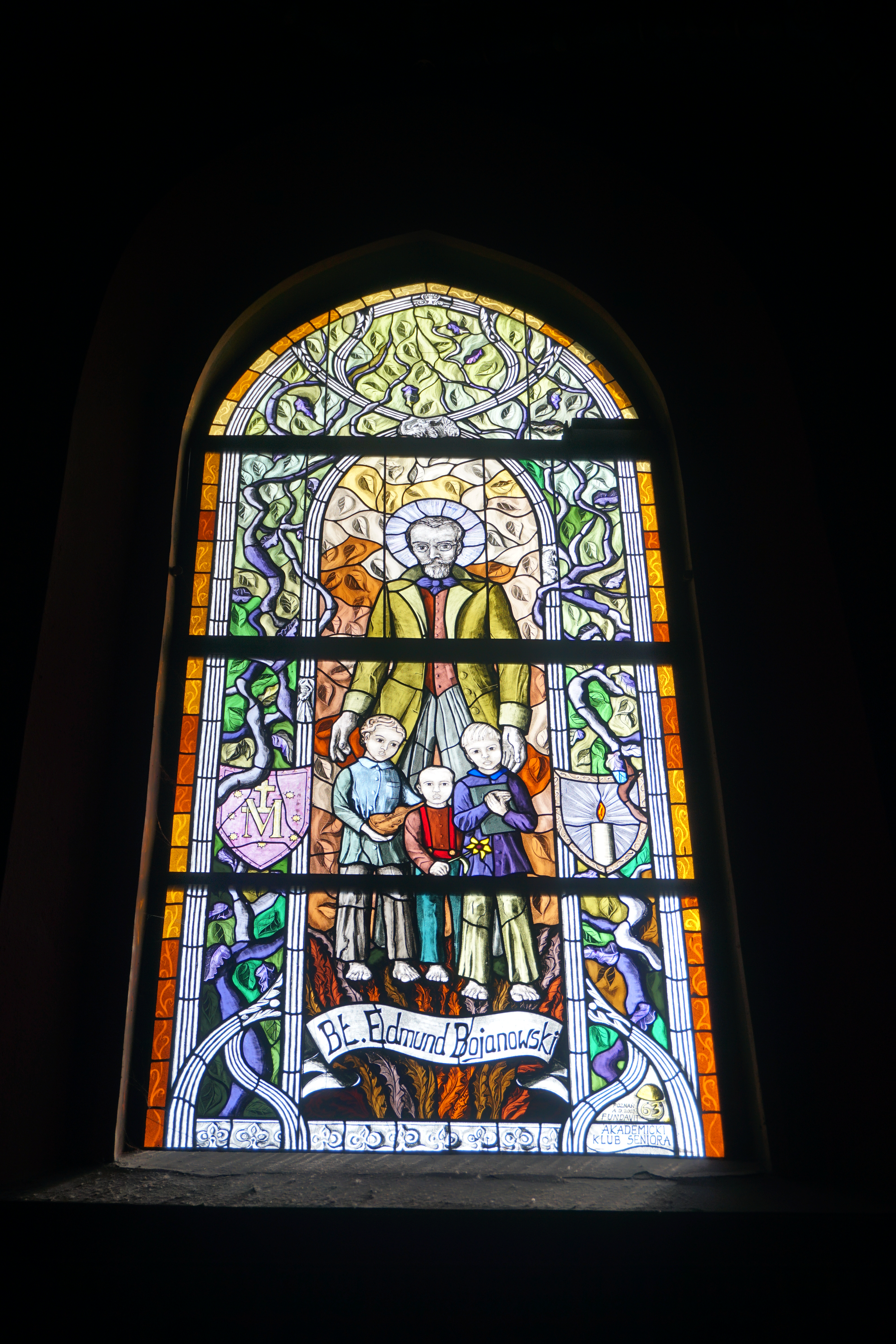 witraż z wizerunkiem bł. Edmunda Bojanowskiego w poznańskim kościele św. Wojciecha